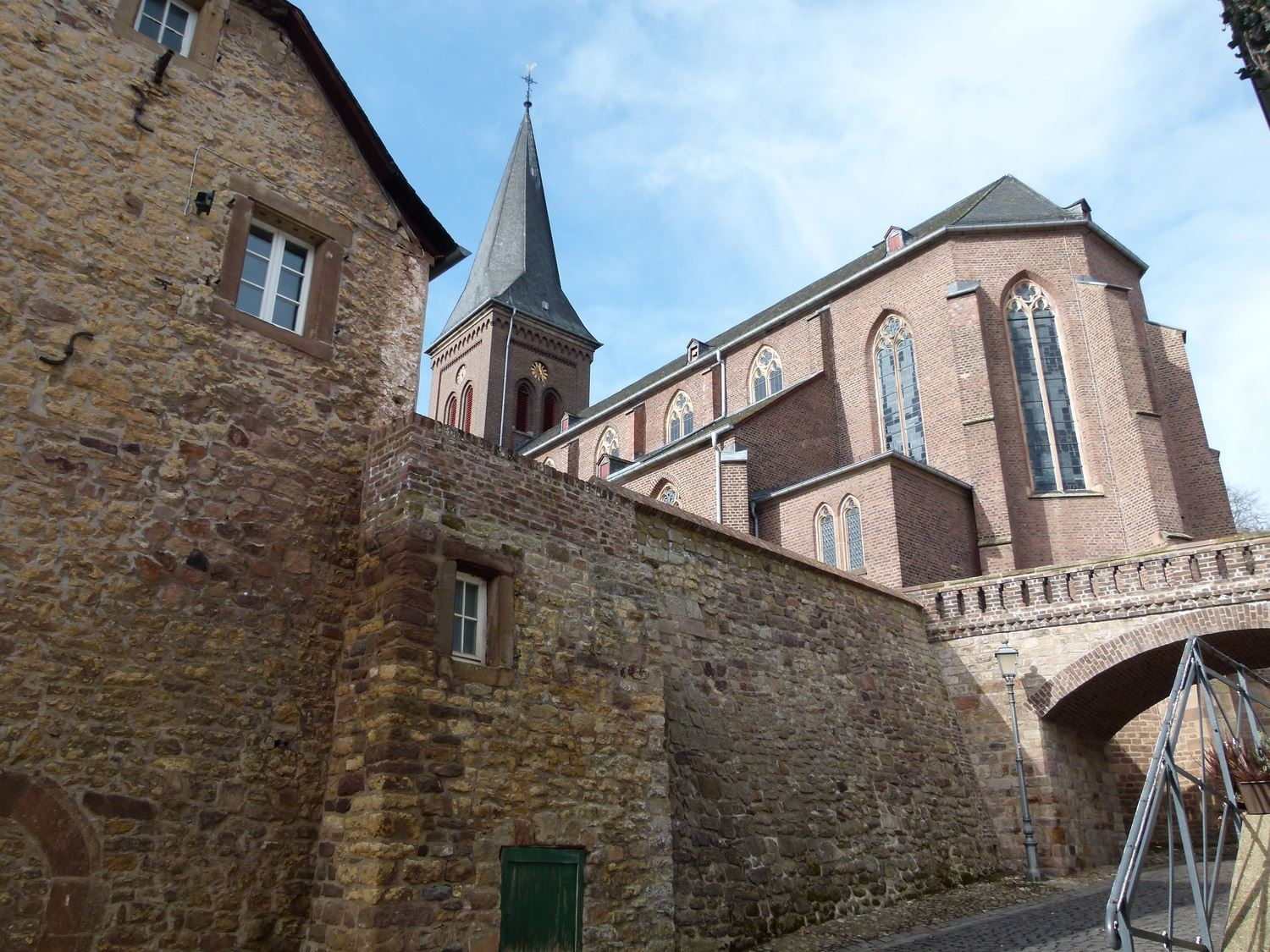 St. Severinus Kommern